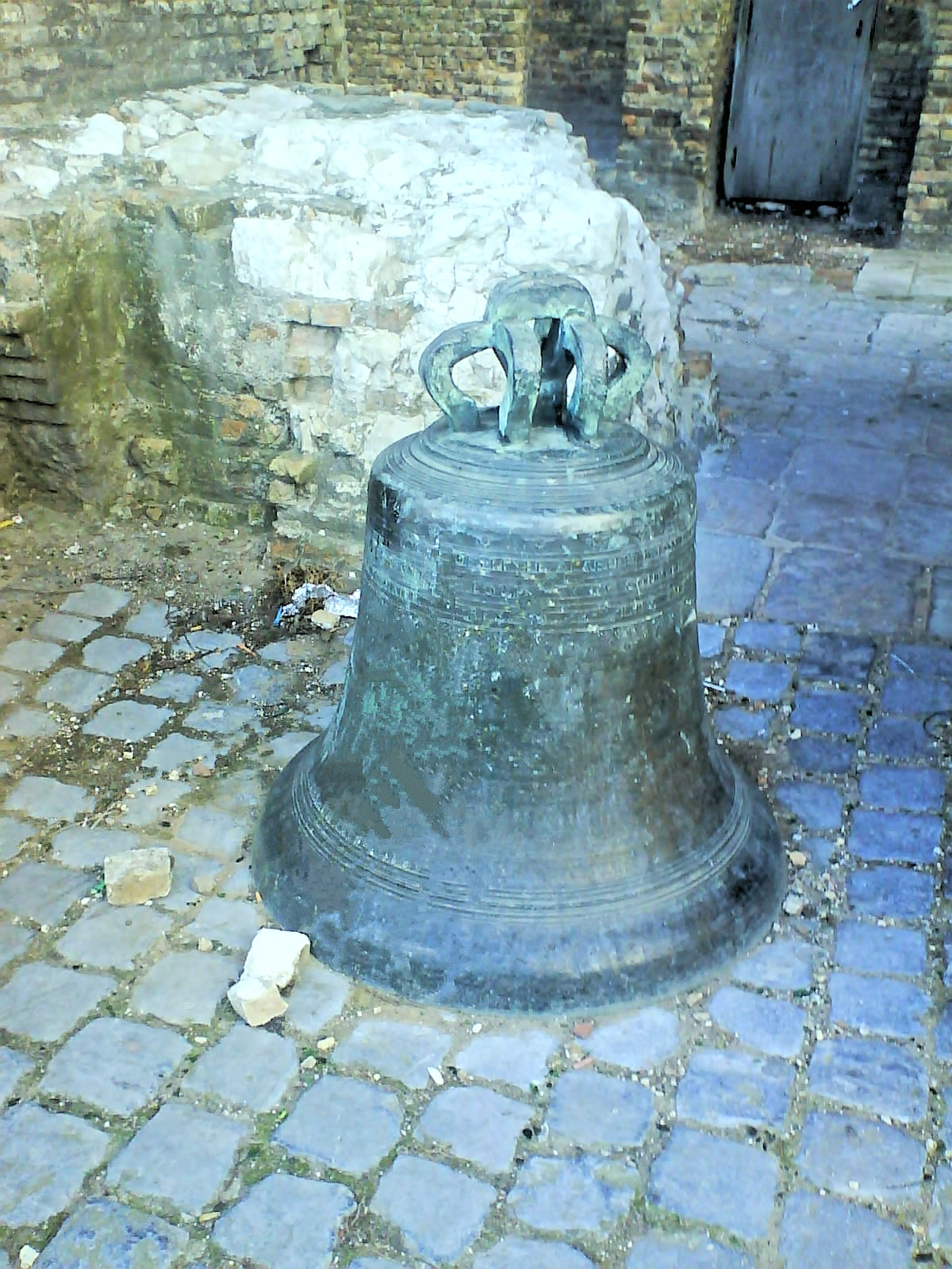 Photo de la cloche de la Tour du Guet de Calais, déposée à ses pieds. Seconde cloche fondue en 1770, au pied de la Tour du Guet de Calais.